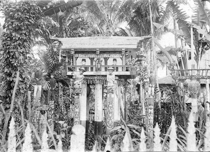 Negatief. Niet alleen de levenden wonen in huizen. Ook voor de doden bouwden verschillende Dajak stammen een soort huizen. Deze ossuaria, geestenhuizen of knekelhuizen (salong, sandong, sandung, lungun) stonden op hoge palen net als de andere huizen van de Dajaks. Veel Dajak groepen meenden namelijk dat de wereld van de gestorvenen net zo georganiseerd was als die van de levenden. Doden (zielen, geesten) woonden ook in vestigingen aan een rivier in een longhouse. Overigens werd er voor een overledene, van wie de ziel een lange reis moest maken, vaak tweemaal een ceremonie gehouden. Bij de tweede keer werden de botten dan opgegraven en in het knekelhuisje gelegd. (P. Boomgaard, 2001). Geestenhuis bij Pangkoh aan de Kahajan-rivier, versierd met vele beelden en schilderingen Geestenhuisje bij Pangkoh, Boreno's Zuider-en Oosterafdeling, ca. 1915